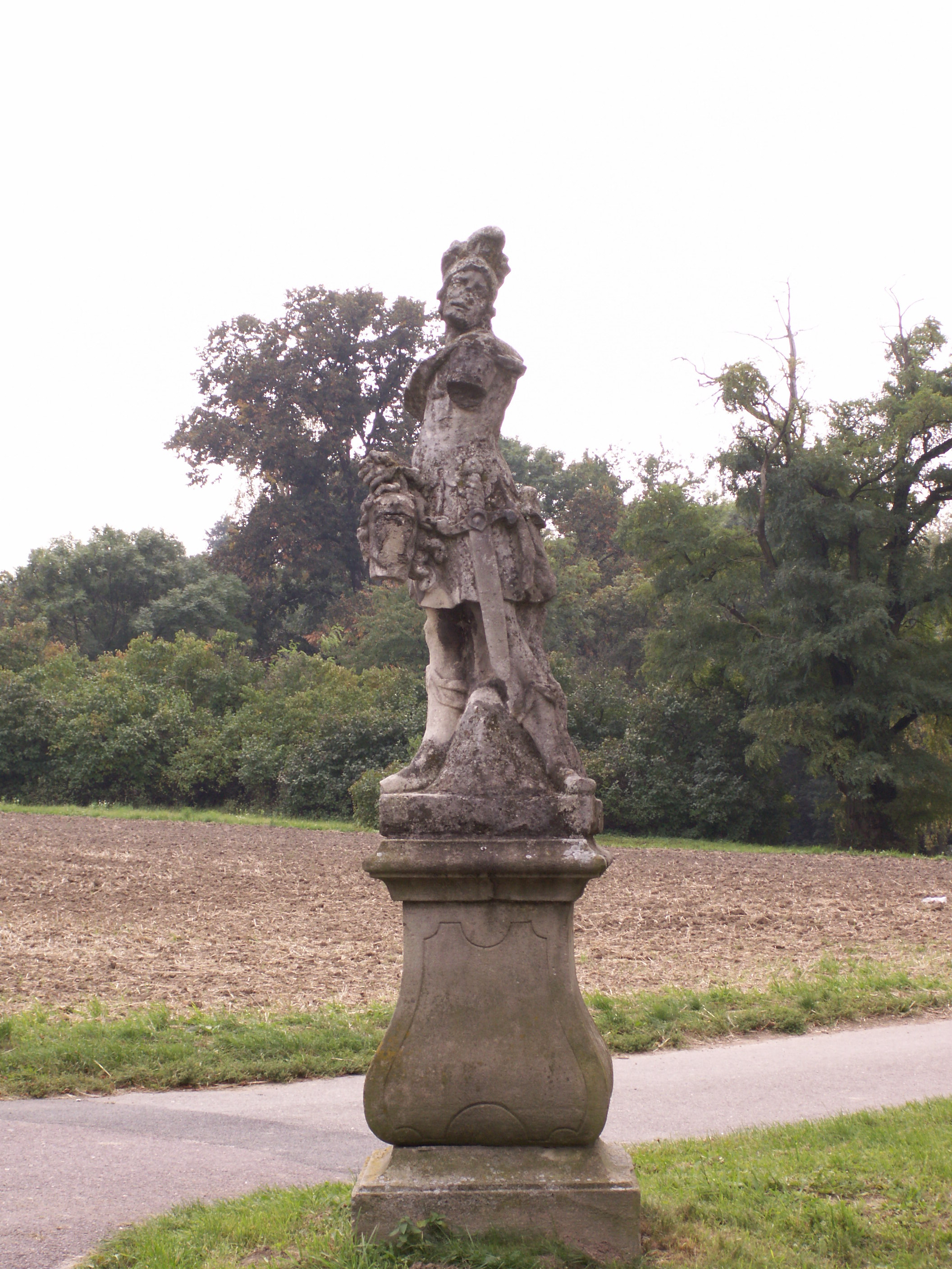 zámek Višňové - socha Persea (baroko)